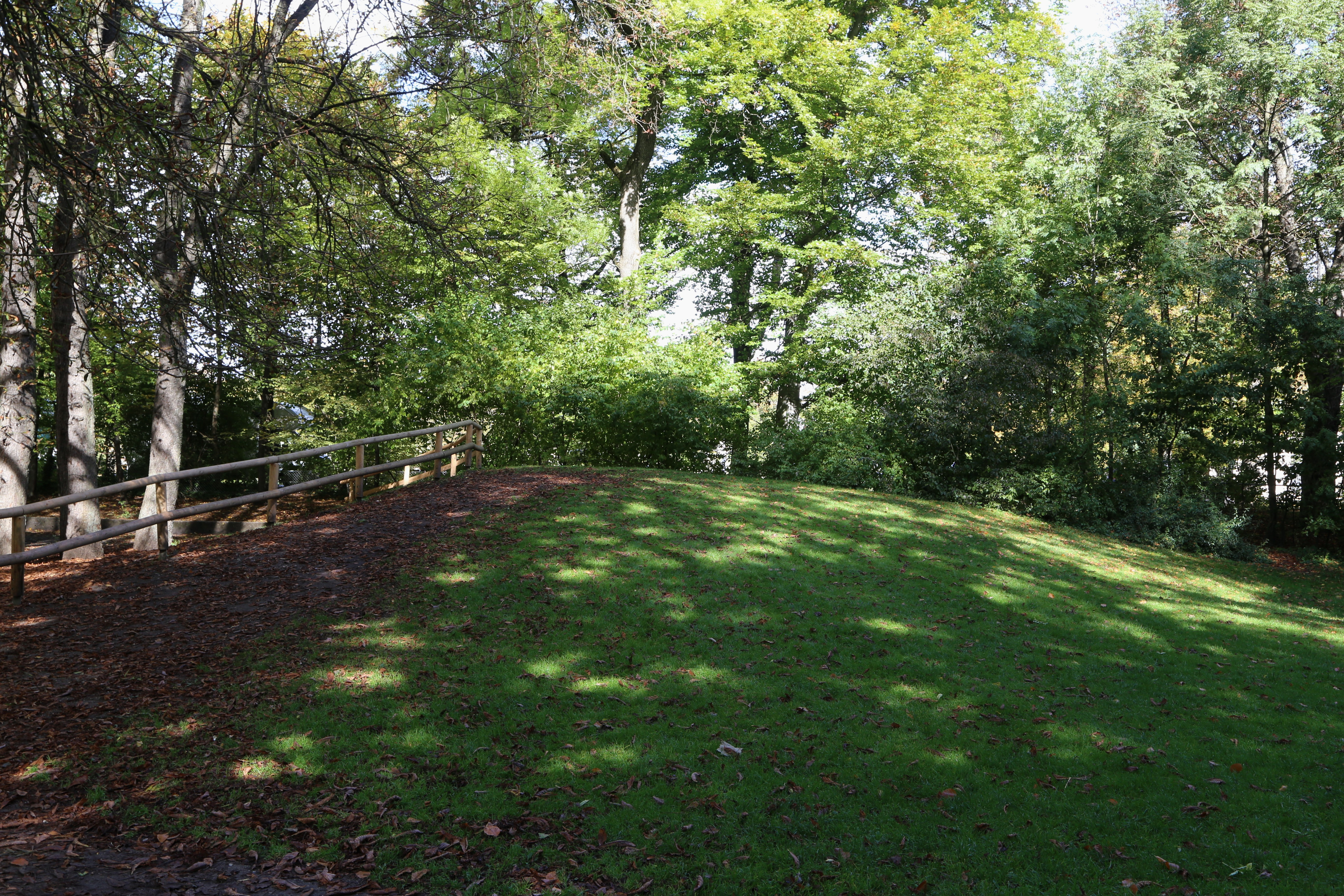 Grünwaldpark, München, liegt im Landschaftsschutzgebiet „Nymphenburg“, LSG 00588.01